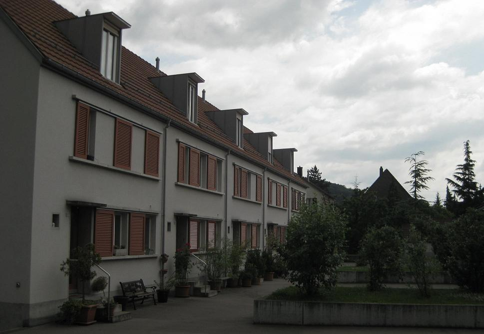 Wasserhaus Wohnsiedlung (neue Häuser) in Münchenstein BL Switzerland